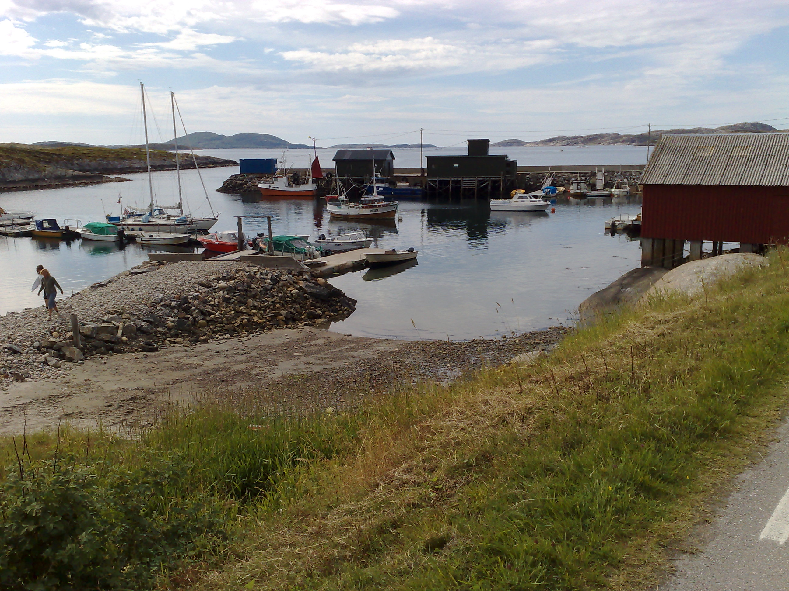 Utvorda harbour